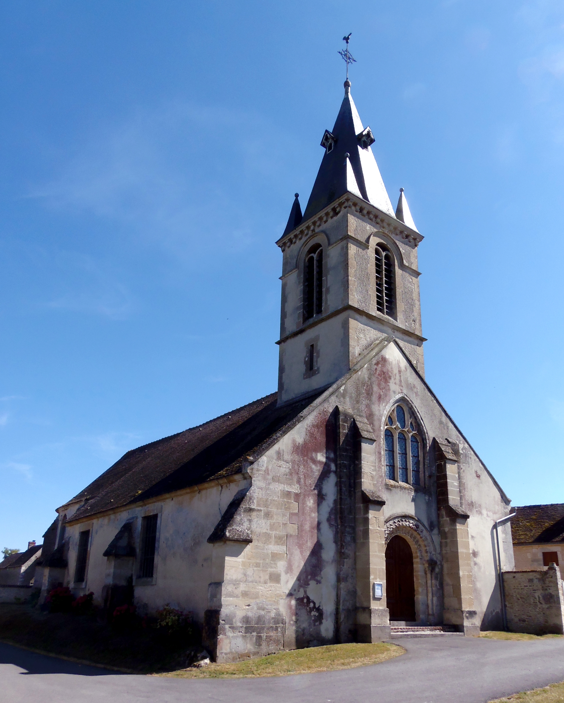 Ommoy (Normandie, France). L'église Notre-Dame.